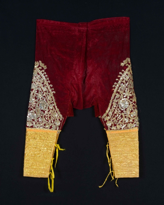 Bordeauxkleurige vrouwenbroek van een traditioneel huwelijkskostuum zoals dit werd gedragen door bruiden in Hammamet. De broek is op het onderste deel van de benen versierd met goudborduursel met geometrische motieven op zijde ondergrond. Daarboven florale en vegetatieve figuren in pailletten, met gouddraad omranding op de dijen. De afboording bovenaan toont gestileerde vogels met open vleugels waarboven vogelfiguren. Het complete kostuum bestaat uit tuniek met bijpassende broek en vestje, een hemd en hoofdtooi. Dit kostuum werd gedragen op de derde dag van het huwelijksritueel, de zogenaamde 'jelwa' dag, wanneer de bruid getoond wordt aan de familieleden, de huwelijkscontracten uitgewisseld worden en de inventaris van de bruidsschat opgemaakt. Tijdens haar eigen bruiloft droeg de bruid deze broek onder een tuniek (6353-1), alleen het onderste deel van de benen in goudborduursel was dan zichtbaar. Het vestje (6353-2a) droeg zij met de broek ook tijdens andere gelegenheden.